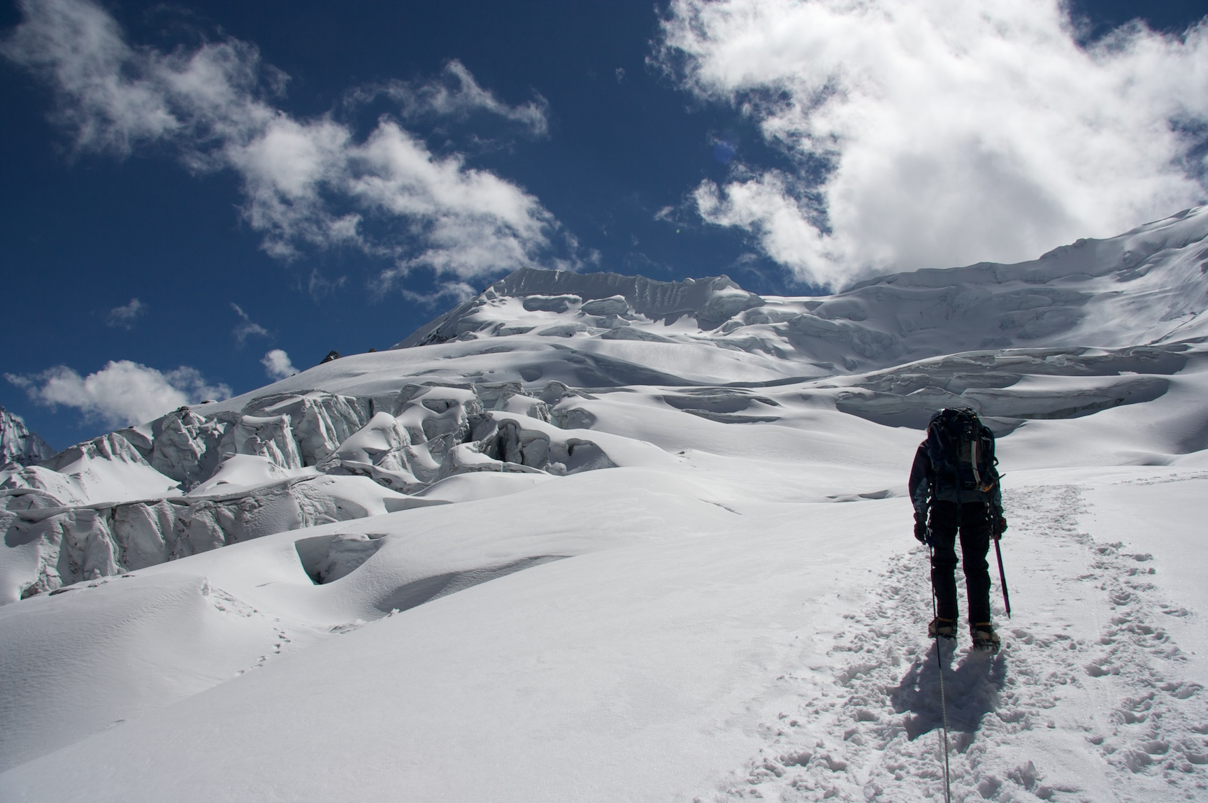 Yanapaccha